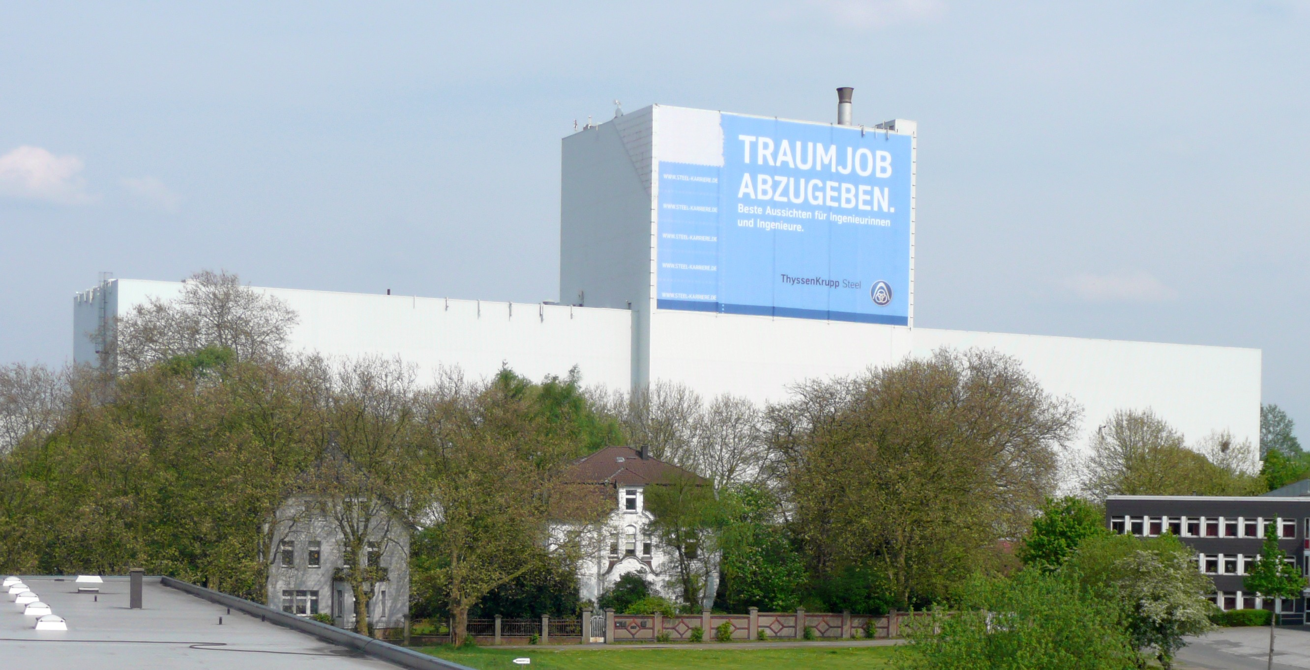 Eine Fertigungshalle von Thyssen-Krupp in Bochum